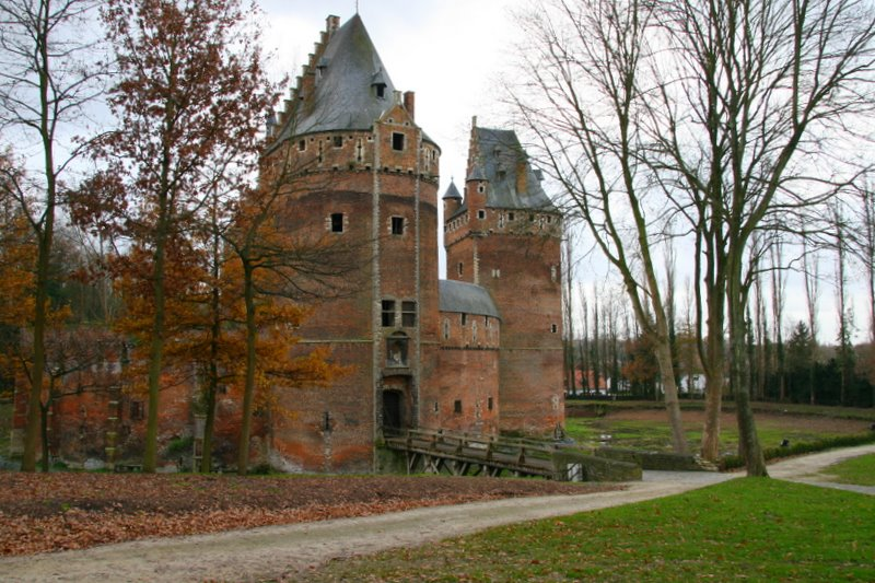 A beerseli kastély kapuja, Belgium